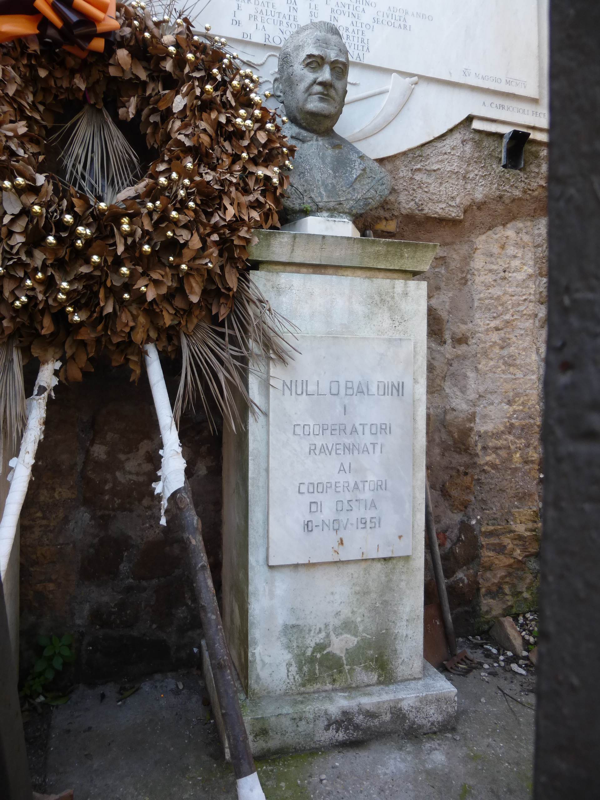 Borgo di Ostia antica. Memoria della colonia cooperativa. Busto di Nullo Baldini.